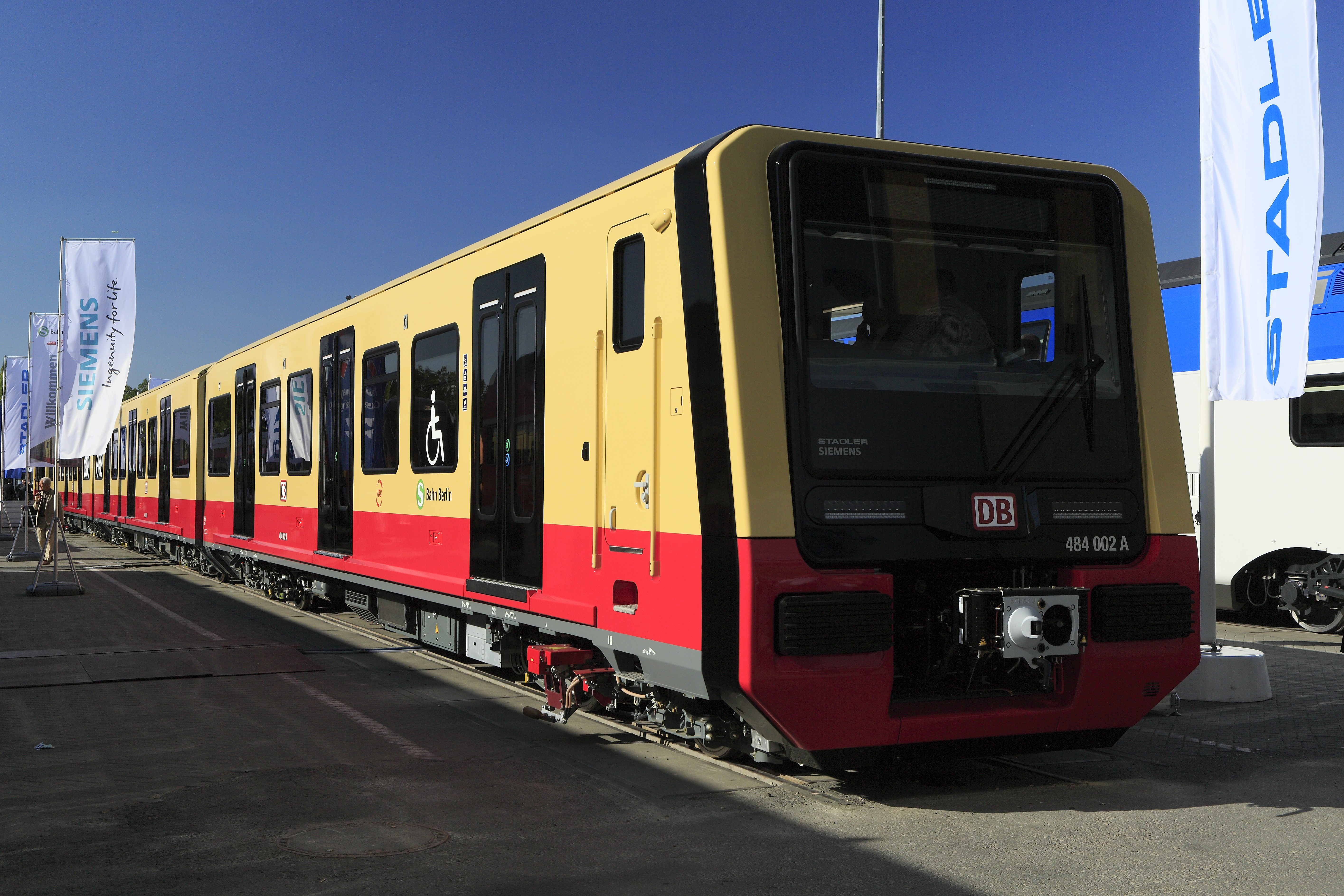 Die Einheiten der Reihe 484 sind durchgehend begehbare Halbzüge. Wegen der notwendigen Festigkeit der Halbzugenden und der Kupplungshöhe liegt der Führerstandsboden deutlich höher als der im Rest der Einheit. Die Wagenlängen und die Laufwerksanordnung entsprechen den Vorgängerbaureihen, die Fahrmotoranordnung dagegen nicht. Die Achsfolge ist (1A)Bo’+Bo’(A1)+(1A)Bo’+Bo’(A1), die Endachsen der Viertelzugeinheiten sind Laufachsen.Erstmals seit Einführung der EDV-Nummern erhalten die betrieblich nicht trennbaren Halbzugeinheiten wieder eine gemeinsame Ordnungsnummer, die einzelnen Wagen werden mit Buchstaben gekennzeichnet. Die massive Verbreitung von Trieb- und Gelenkzügen und eigene Nummern auch für nicht einzeln lauffähige Teile von Gelenkfahrzeugen mit Jakobsdrehgestellen brachte zusammen mit der unglücklich belegten fünften Stelle aus Rücksicht auf die DB den an sich reichlich angelegten UIC-Nummernplan an seine Grenzen.